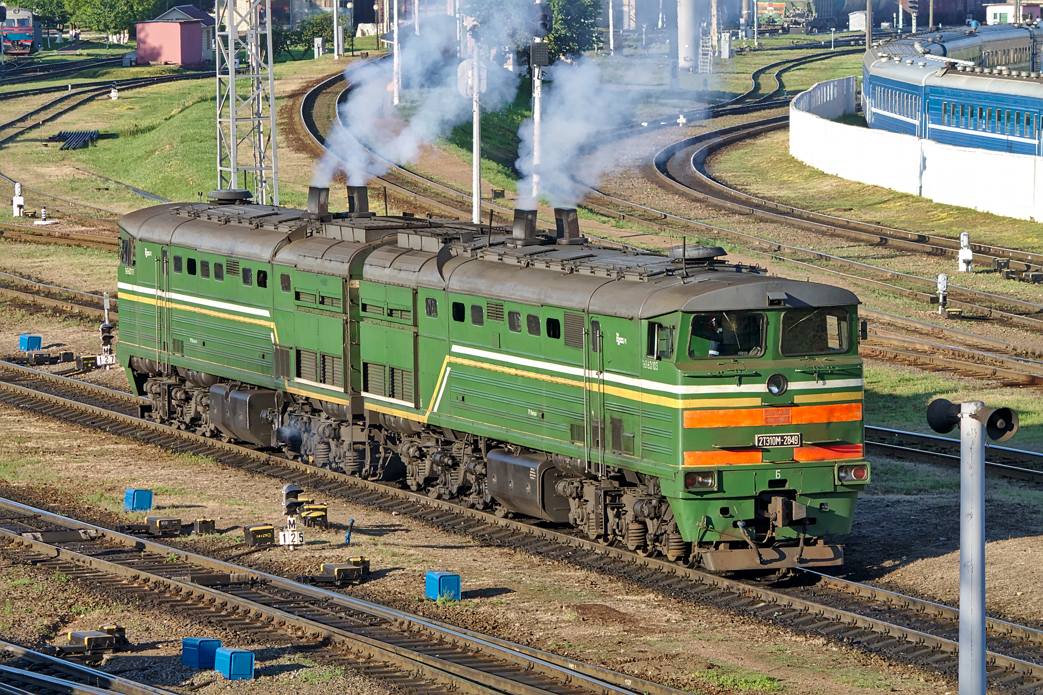 2ТЭ10М-2849. см. фото 600436 в альбоме автора